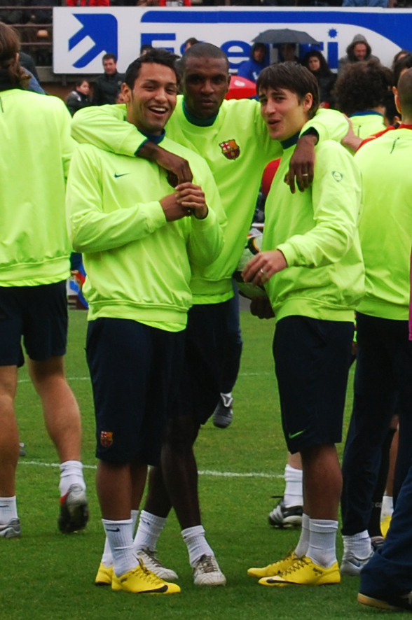 Jeffren Suárez, Éric Abidal y Bojan Krkic, en un entrenamiento en el campo del Reus Deportiu, en conmemoración por su centenario.